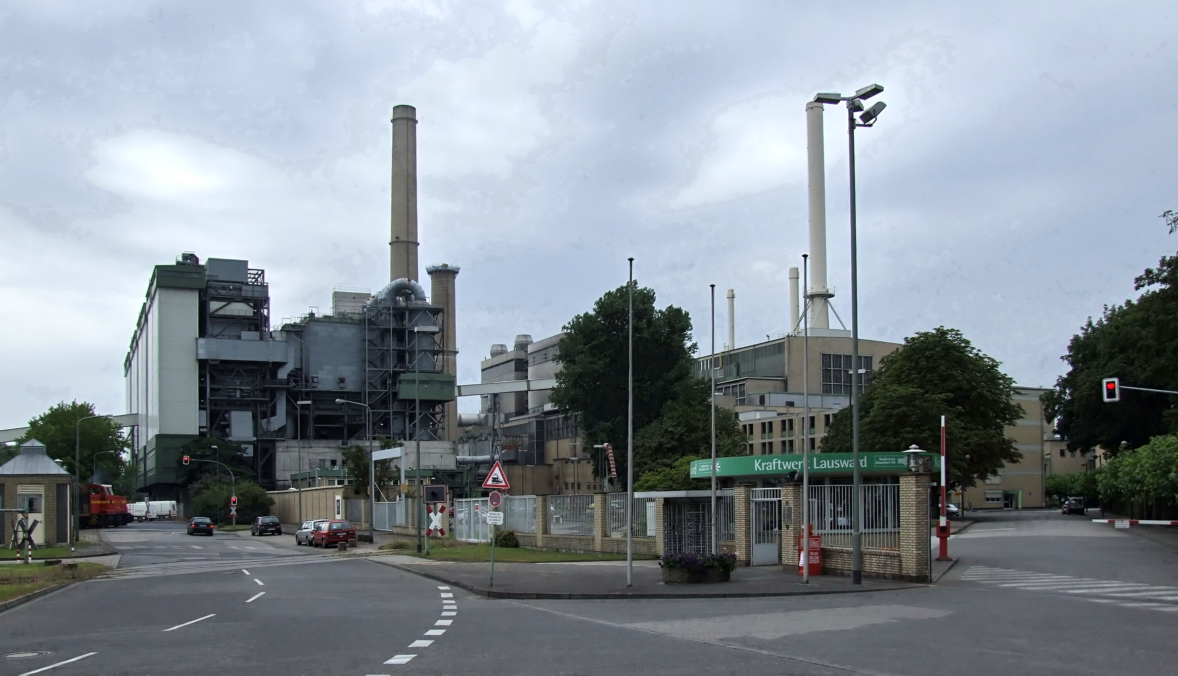 Heizkraftwerk auf der Lausward im Düsseldorfer Hafen